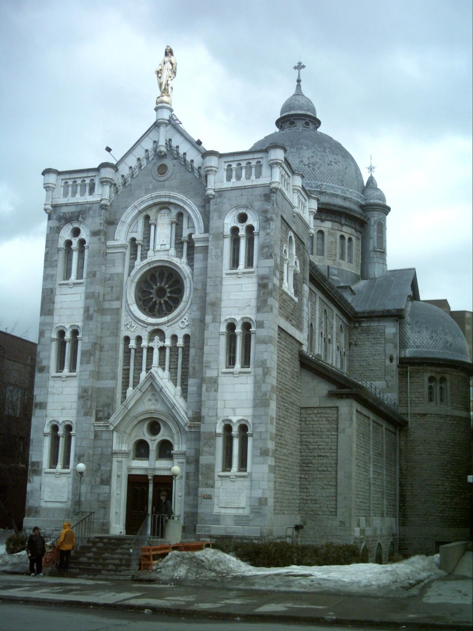 Chapelle Notre-Dame-de-Lourdes à Montréal, au 430 rue Sainte-Catherine est